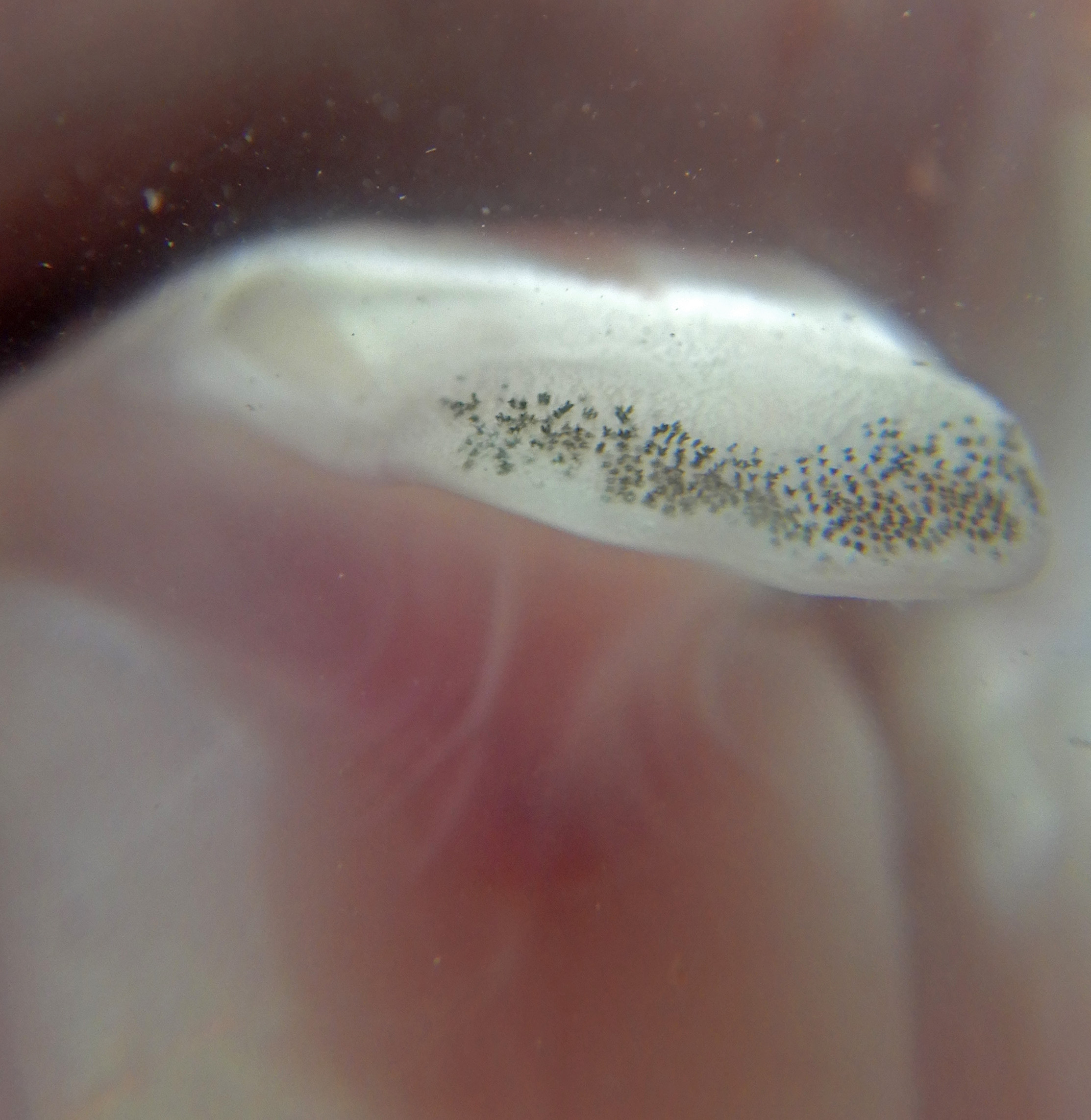 Tête de Bar commun (Dicentrarchus labrax), mort